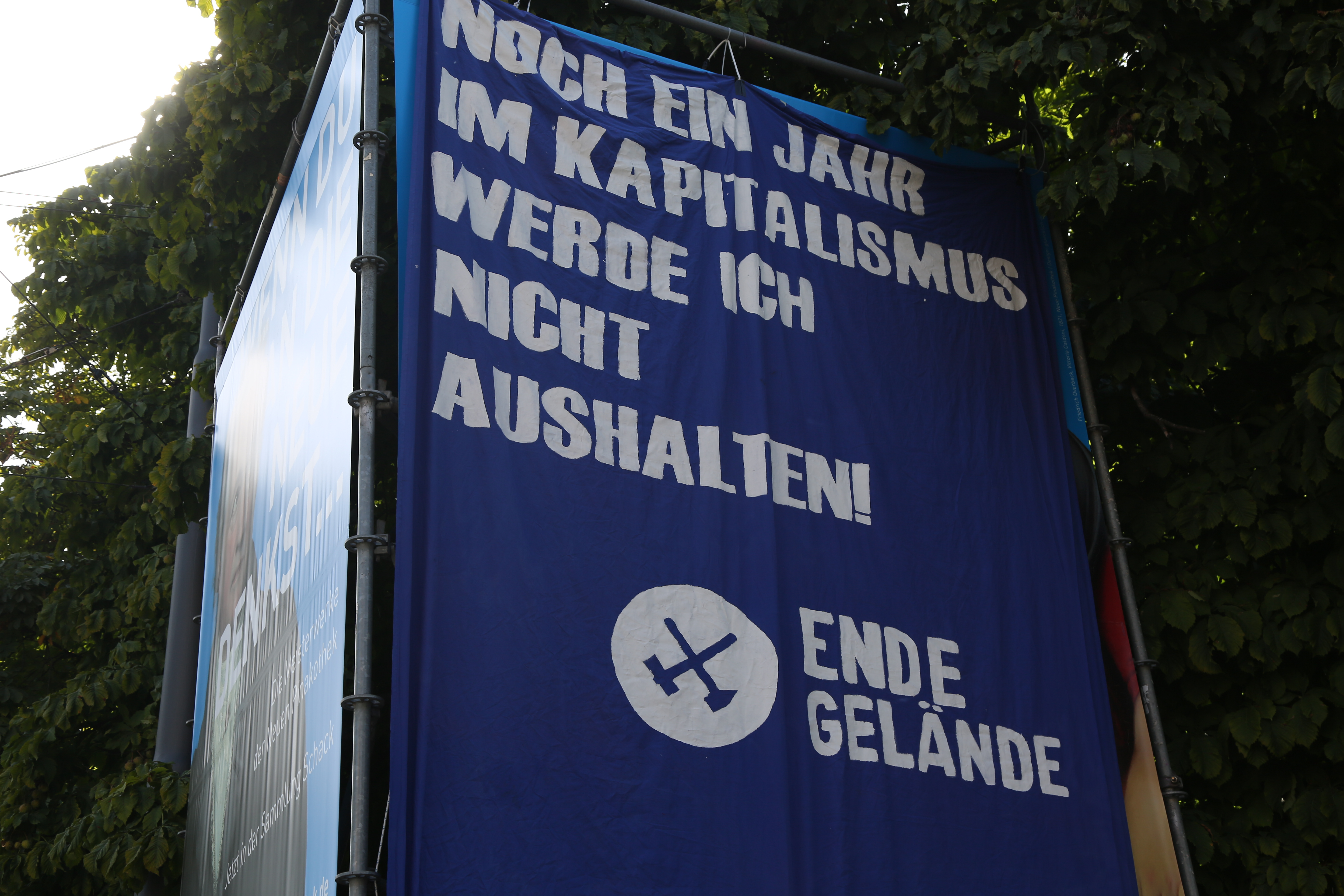 Fridays for future München, am 2019-09-20. Großplakat von Ende Gelände